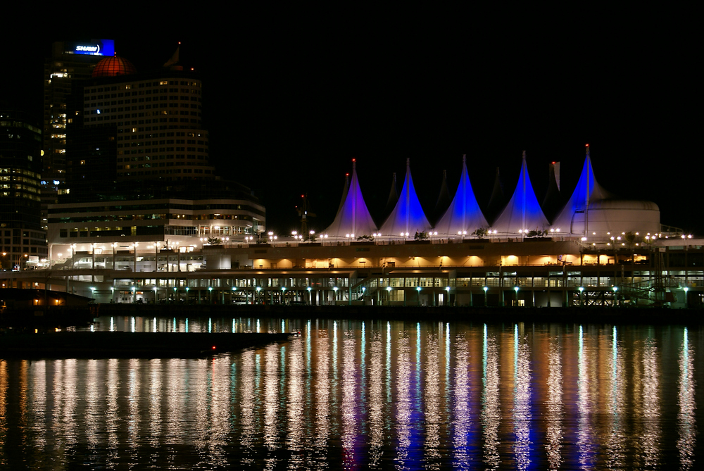 Nachtaufnahme vom Canada Place, Vancouver, Kanada